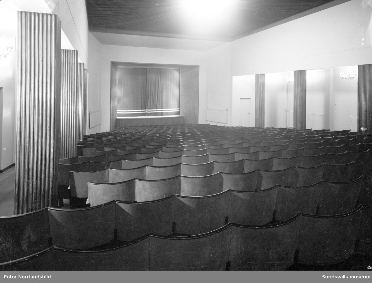 Biografen Röda kvarn uppfördes 1918 i kv Olympia vid Esplanaden av musik- och teatermannen Bror Abelli. På övervåningen fanns ett populärt musikkafé. Byggnaden revs 1973. Vykort.